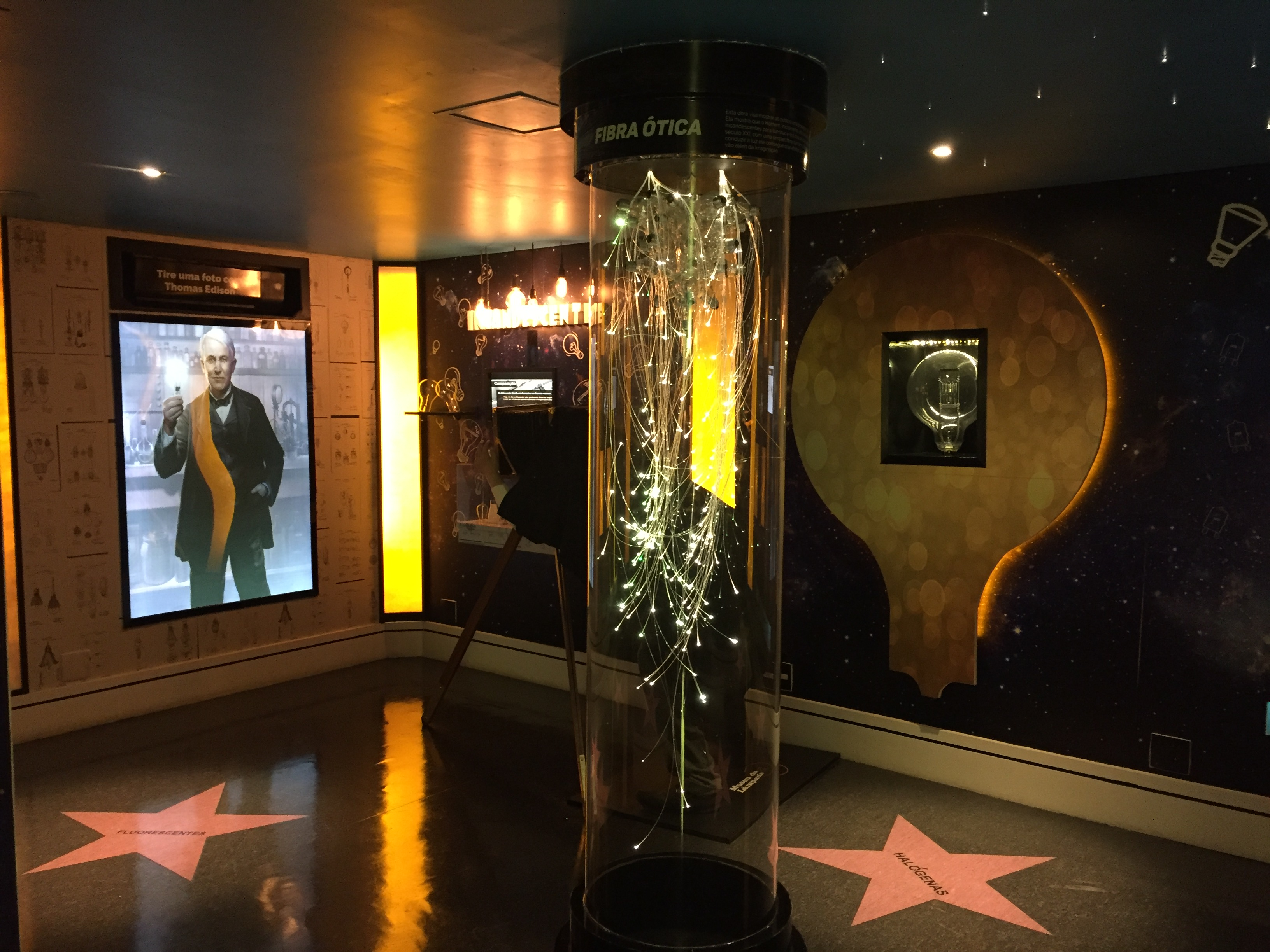 Visão mais abrangente sobre a segunda sala Adquirindo um panorama geral.